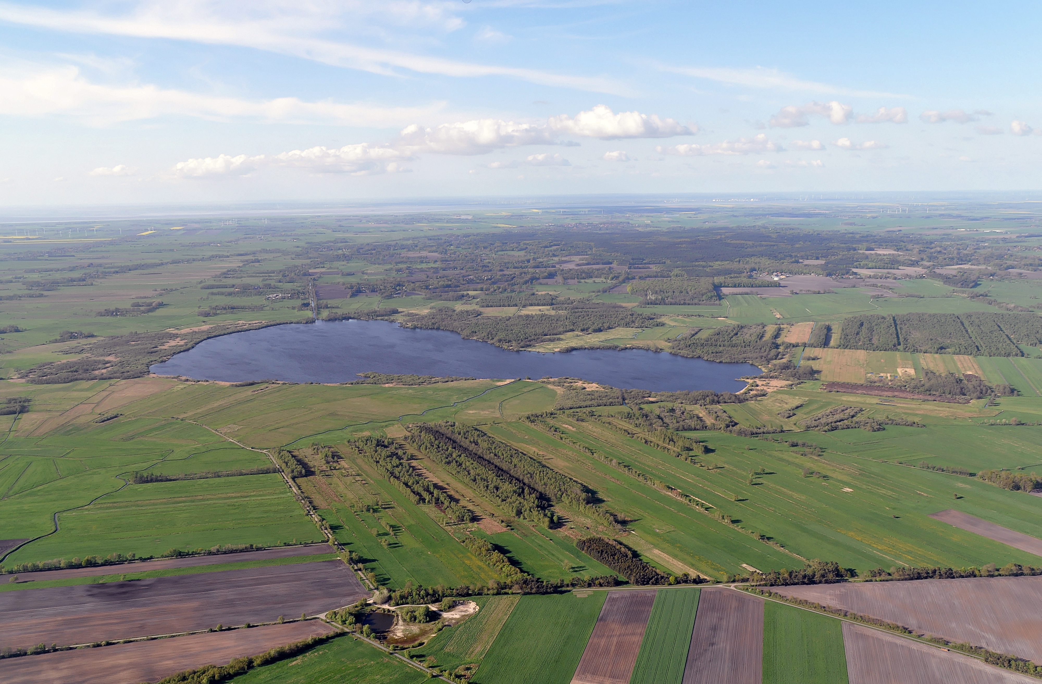 Luftbilder von der Nordseeküste 2012-05: Luftaufnahme des Balksees im Landkreis Cuxhaven, Niedersachsen (Deutschland)